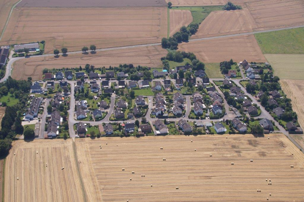 Luftbild von Nienhagen